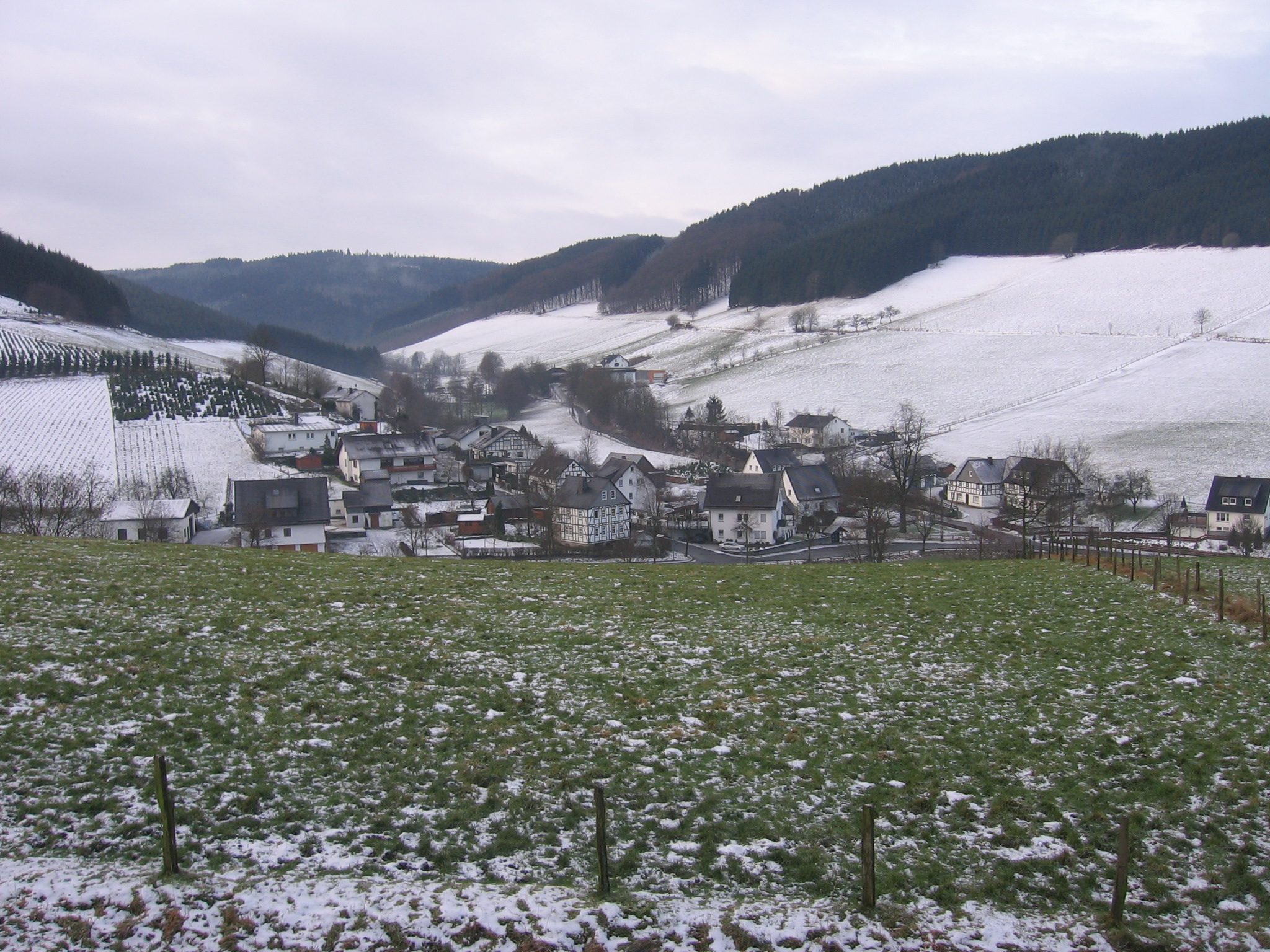 eigen werk